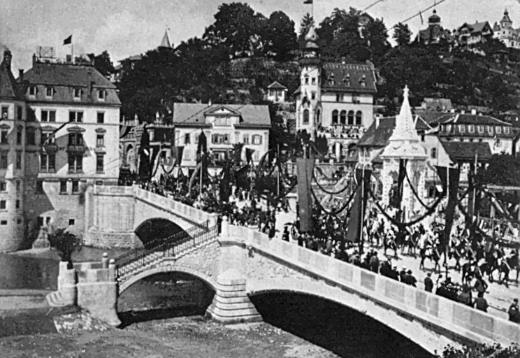 Tübingen, Einweihung der neuen Neckarbrücke, Erster Studenten-Fest-Ausritt, 1901, Sinner-Archiv Nr. 1/326, 164 × 225 mm